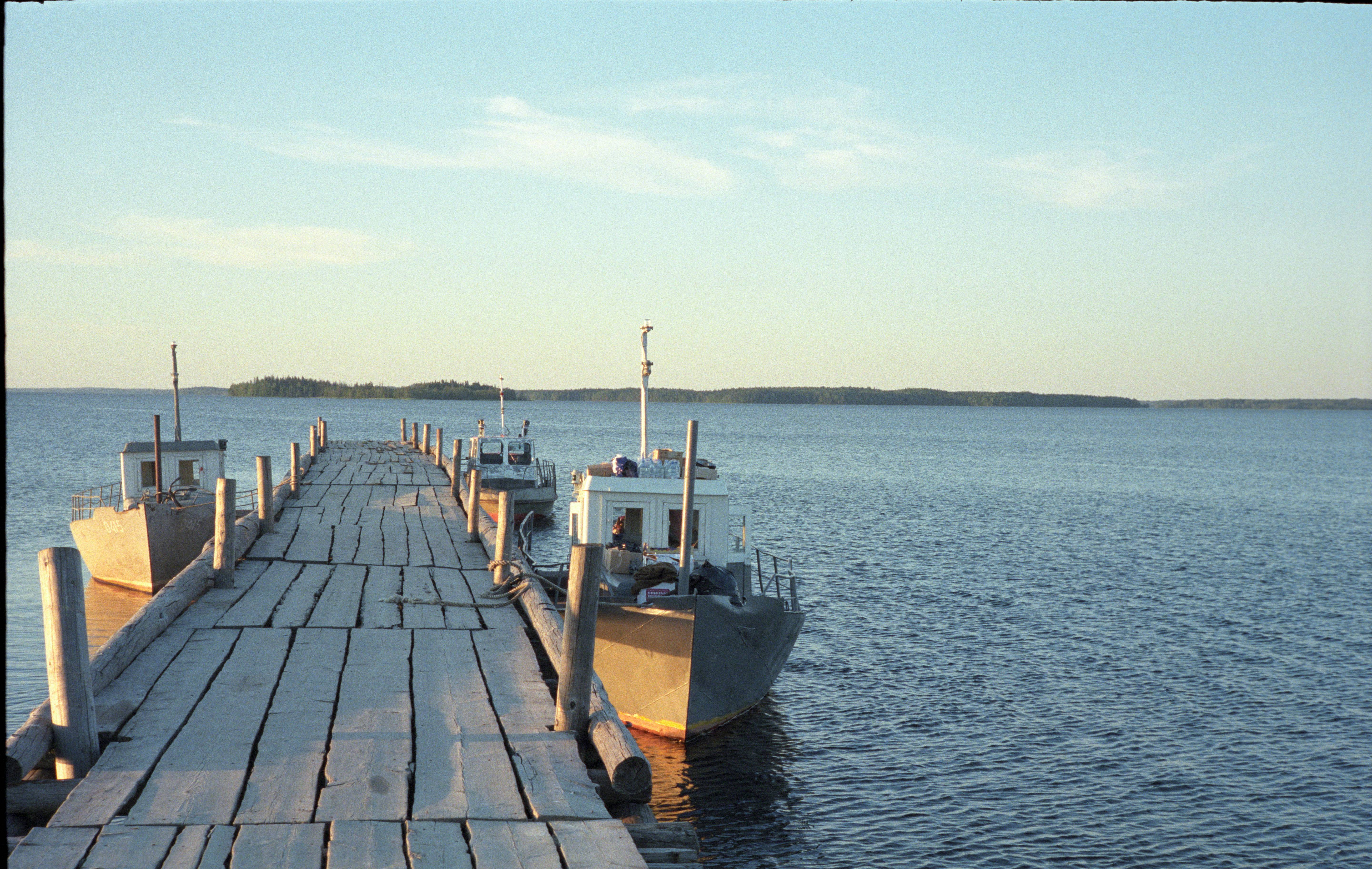 Водлозерский национальный парк: Пудожский район, Карелия, озеро Водлозеро This image is related to the protected area of Russia number 1000188